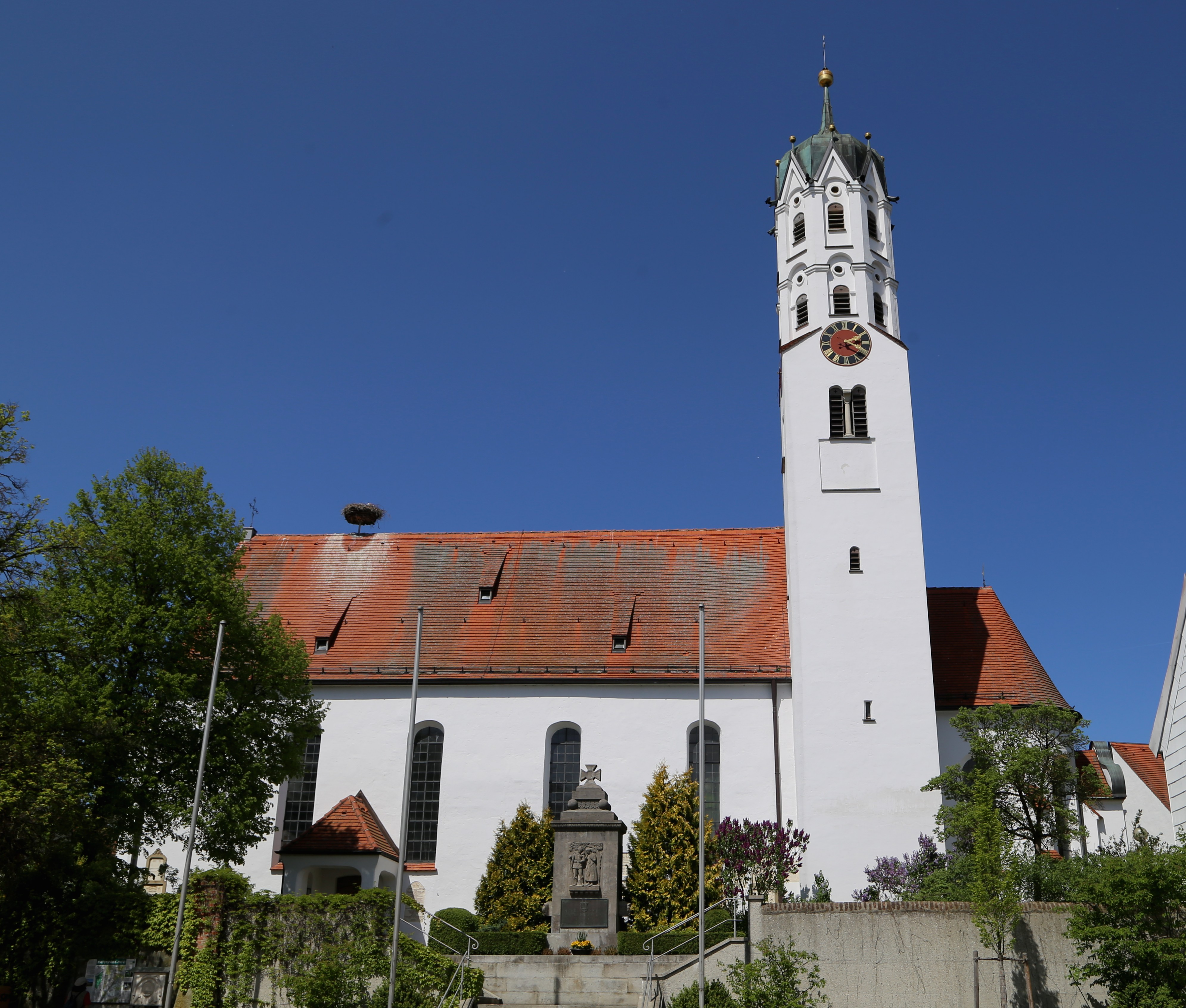 Augsburger Straße 1, Dinkelscherben; Katholische Pfarrkirche St. Anna, 1507 errichtet, Turm um 1580, Barockisierung 1717 und 1770; mit Ausstattung